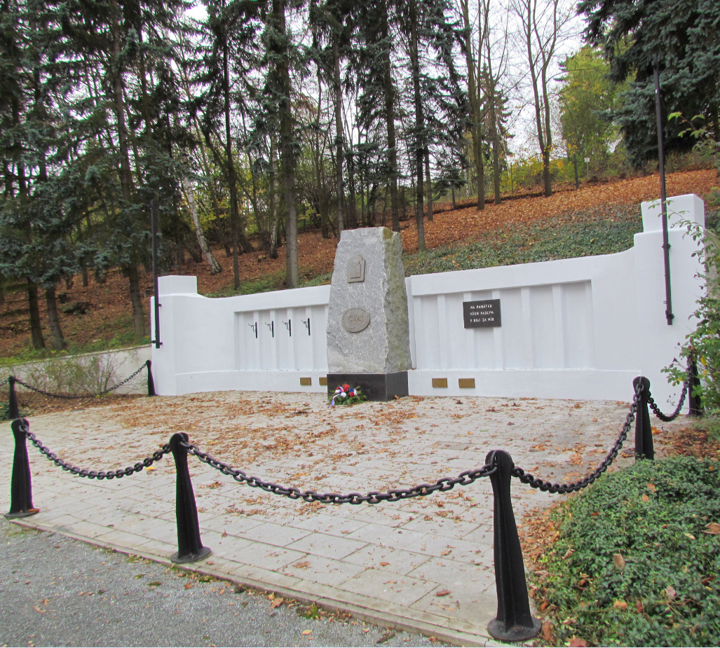 Plzeň 2-Slovany, Východní Předměstí, náměstí Milady Horákové a park Homolka, pomník padlým za svobodu, mír a demokracii.